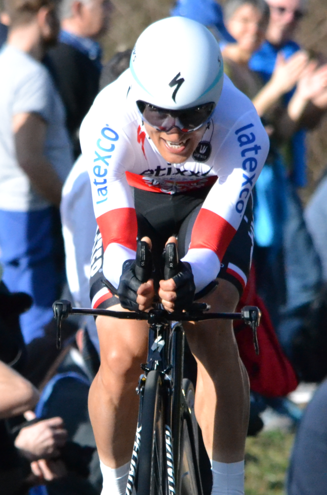 Paris-Nice 2015